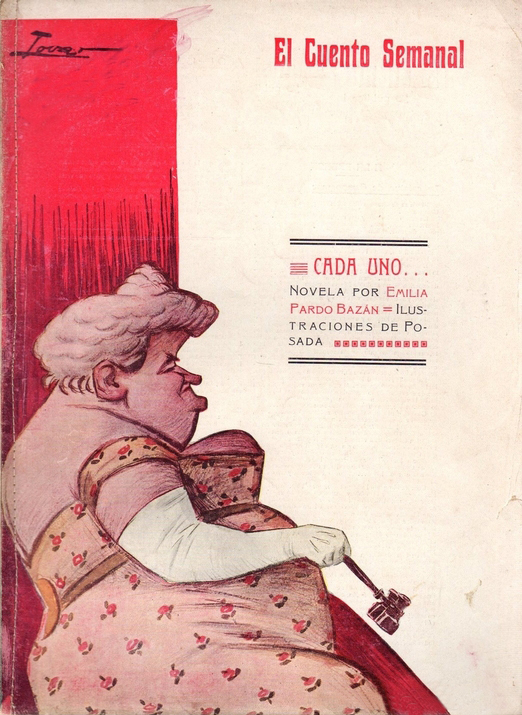 Portada de Cada uno.